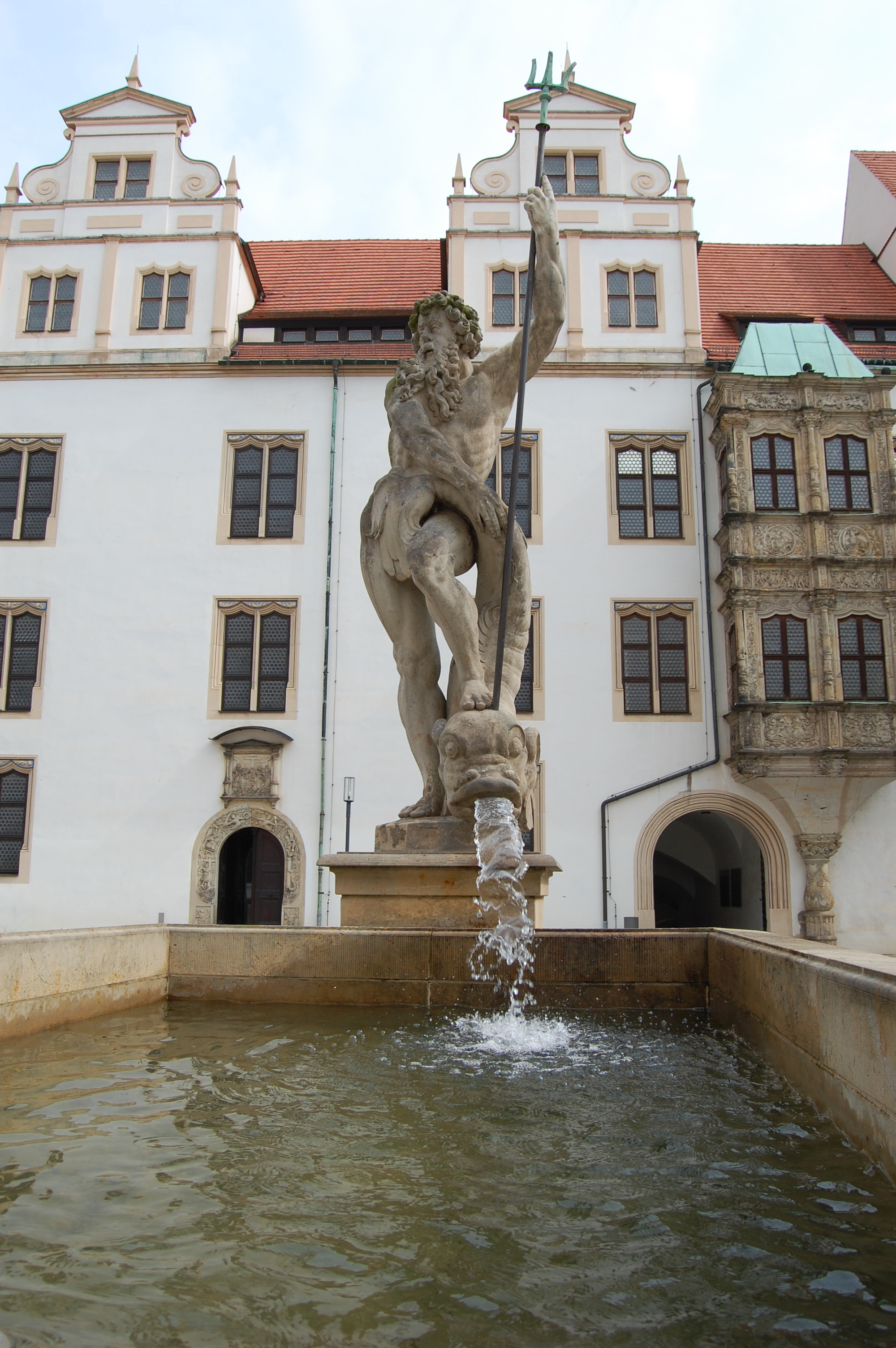 Schloss Hartenfels (2009)